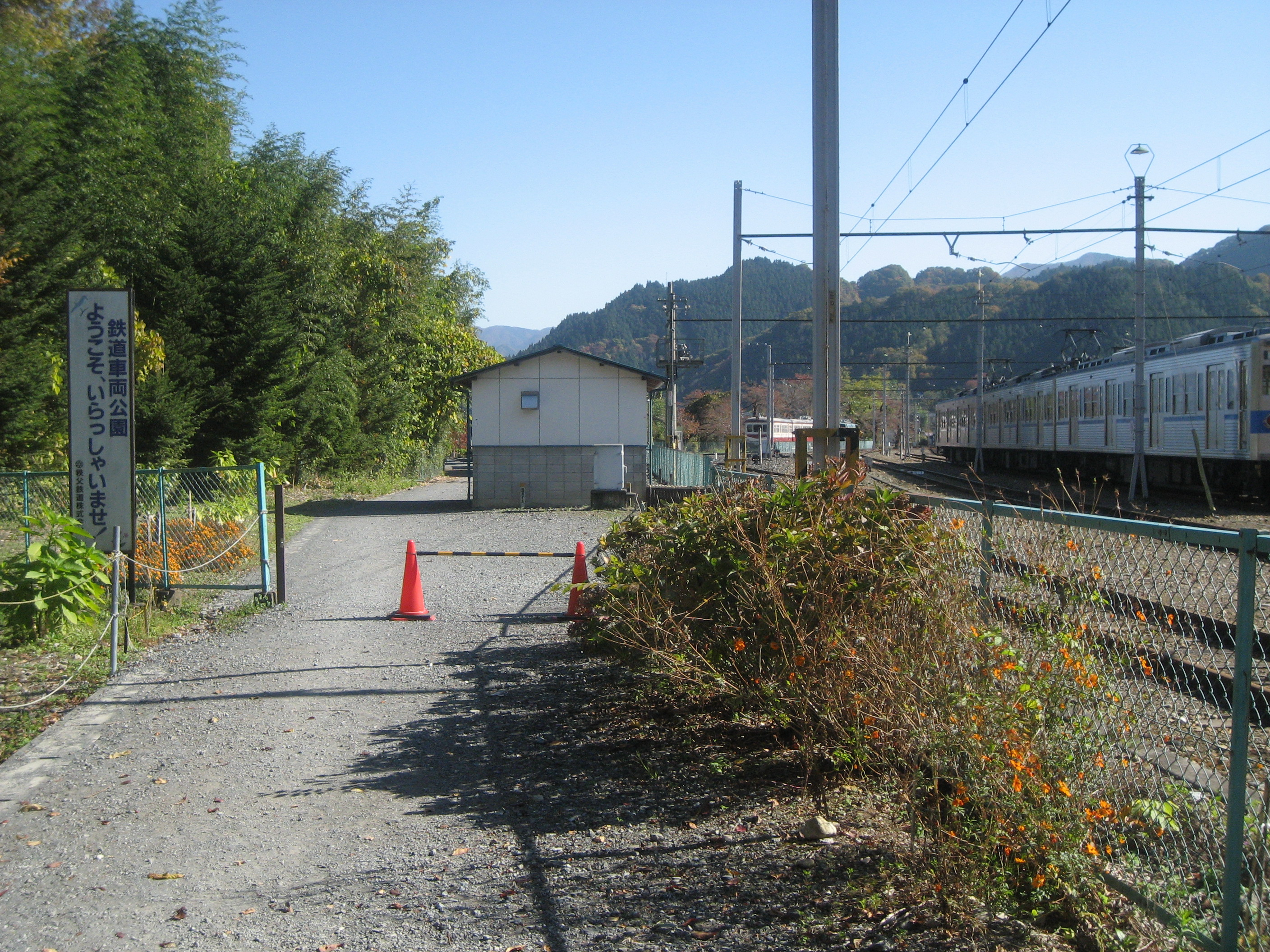 秩父鉄道 鉄道車両公園入口